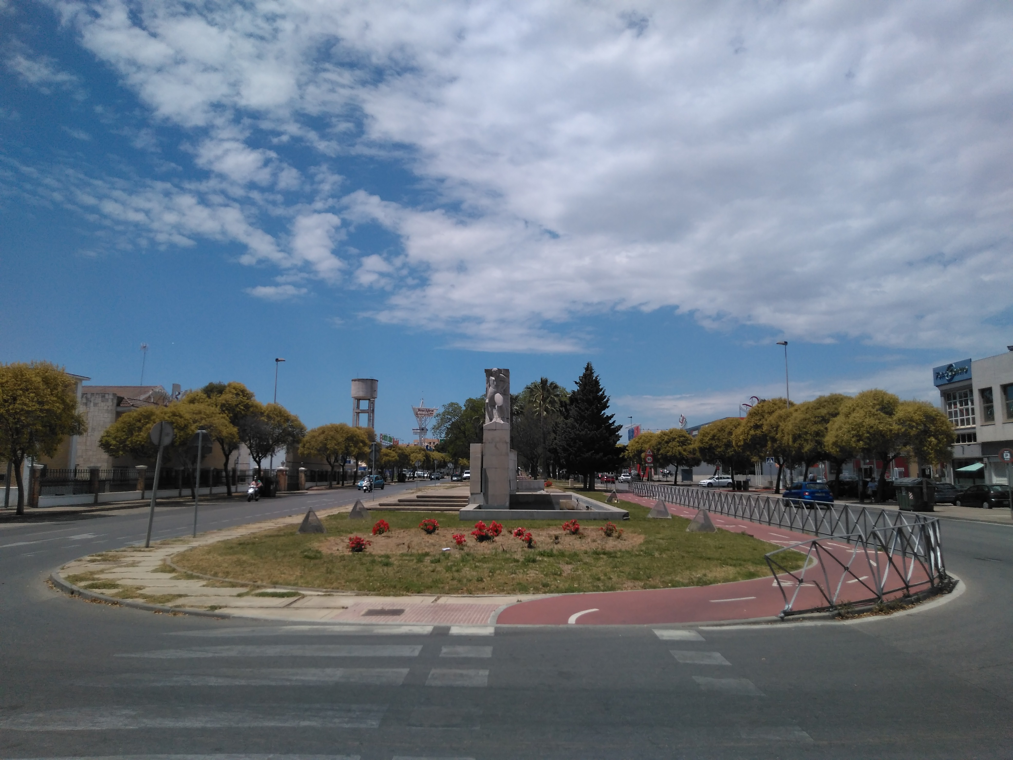 Monumento al Arrumbador de Francisco Pinto Berraquero, en Jerez de la Frontera (Andalucía, España)